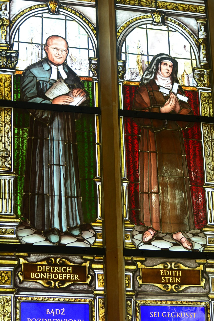 Witraże kościoła św. Krzysztofa we Wrocławiu